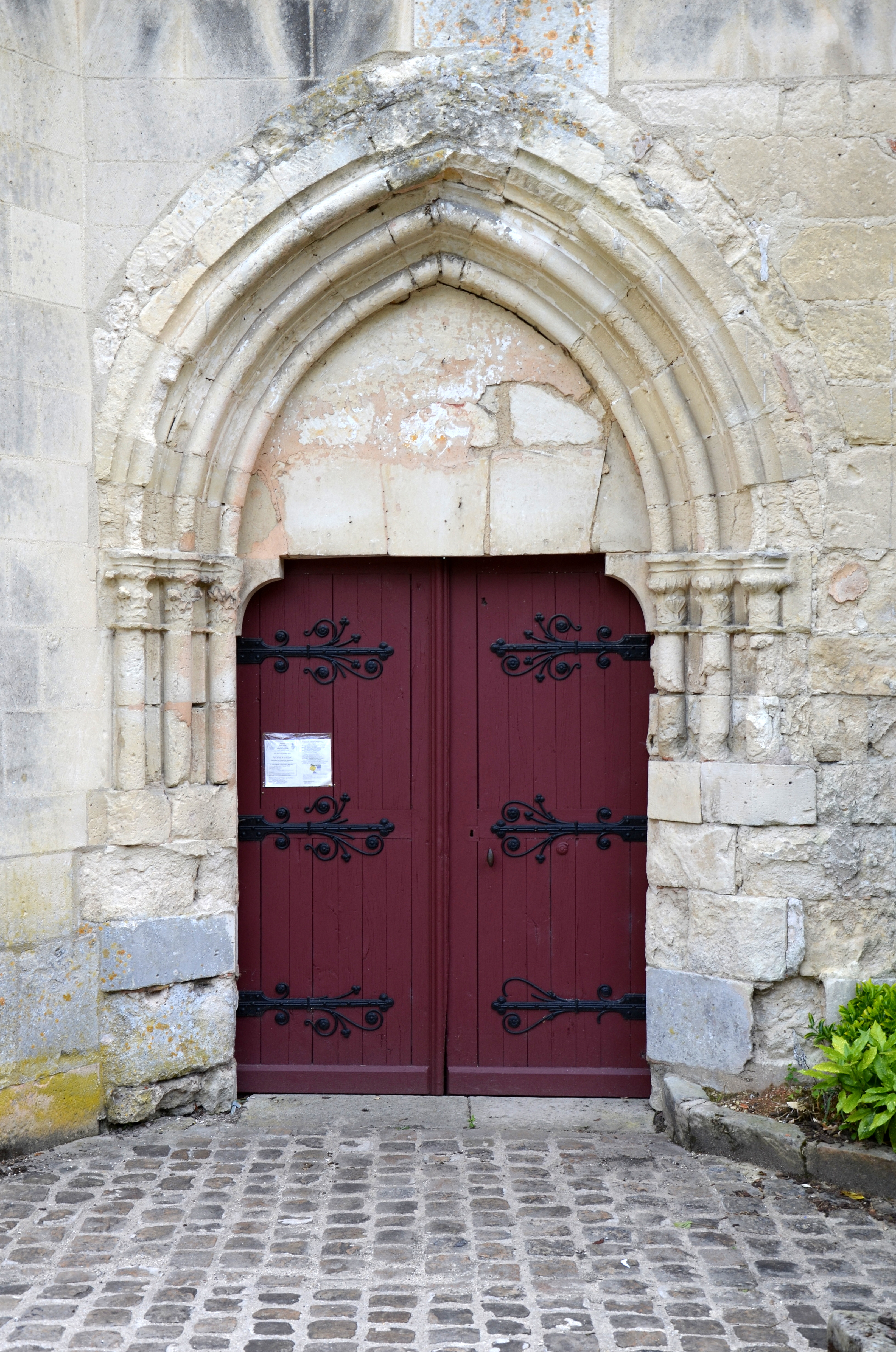 Eglise de Barzy sur Marne, Aisne, France